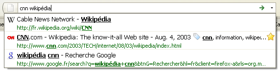 Copie d'écran de la barre d'adresse sur Mozilla Firefox 3 (version Windows XP).